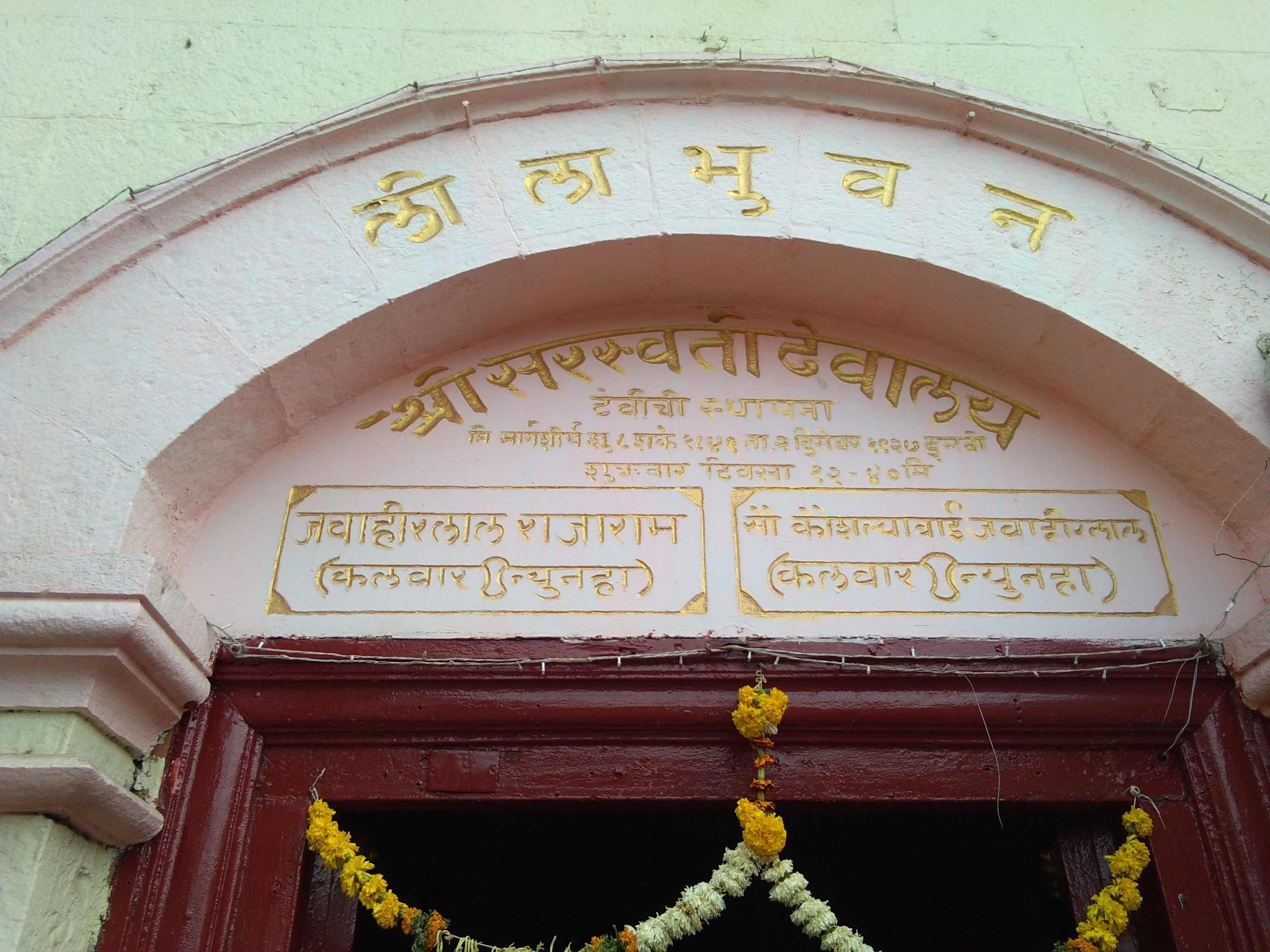 प्रवेशद्वार